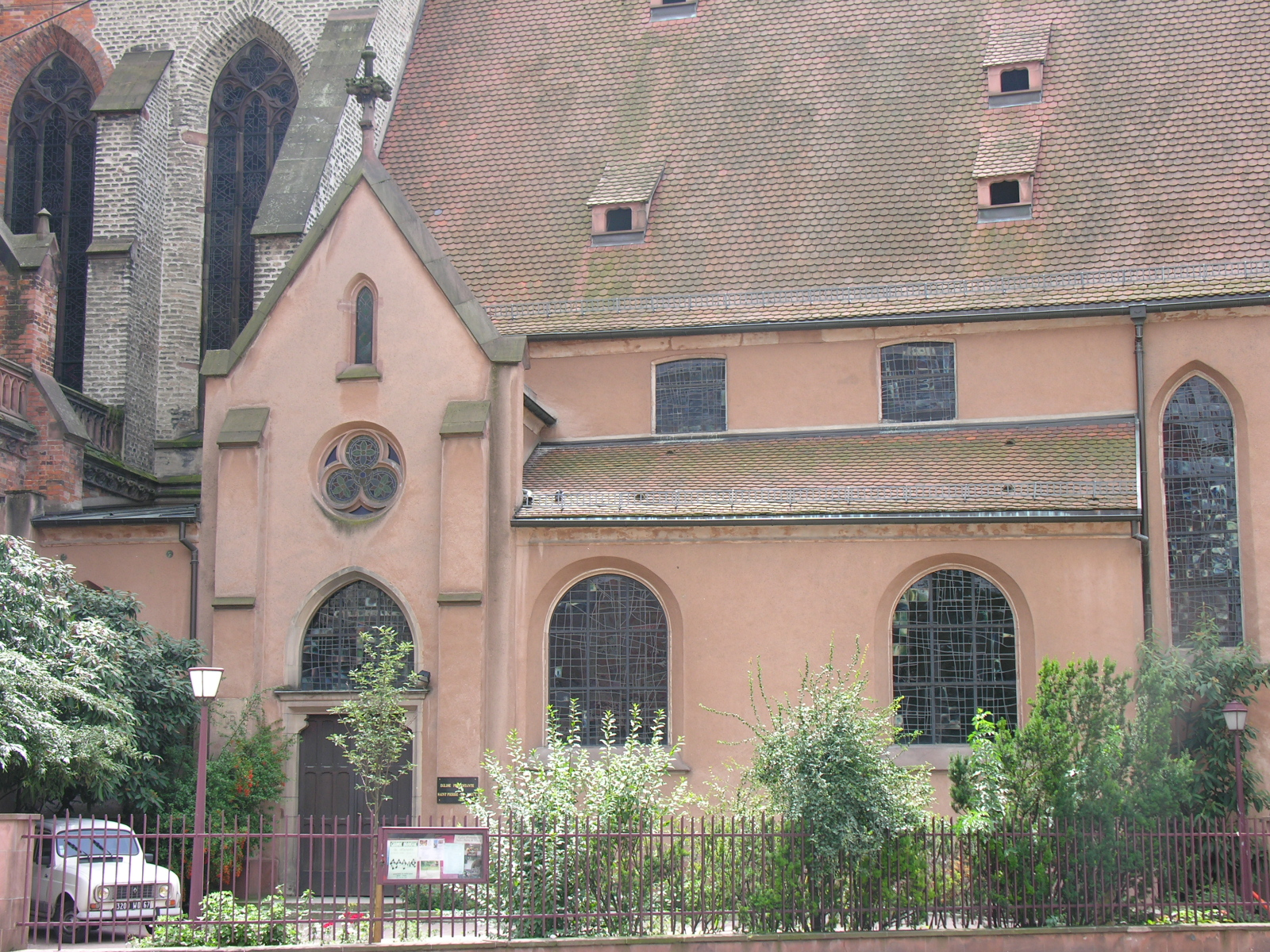 strasbourg 6.8.05 005